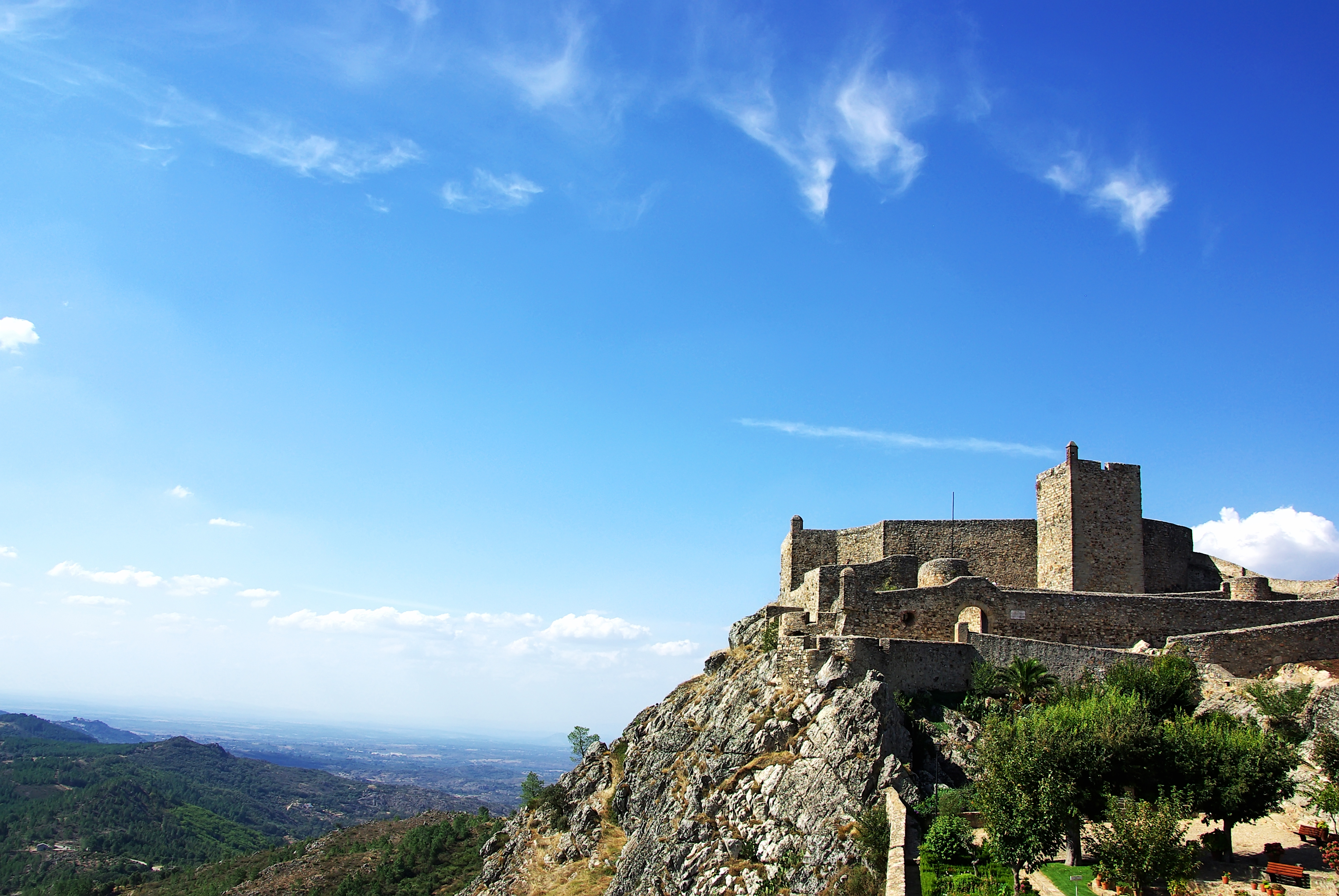 Vista do Castelo de Marvao